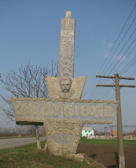 Дашуковка